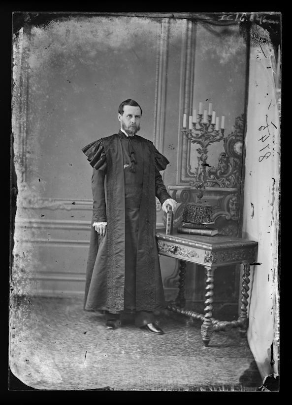 Obra que integra o acervo do Museu Paulista da USP. Coleção Militão Augusto de Azevedo.